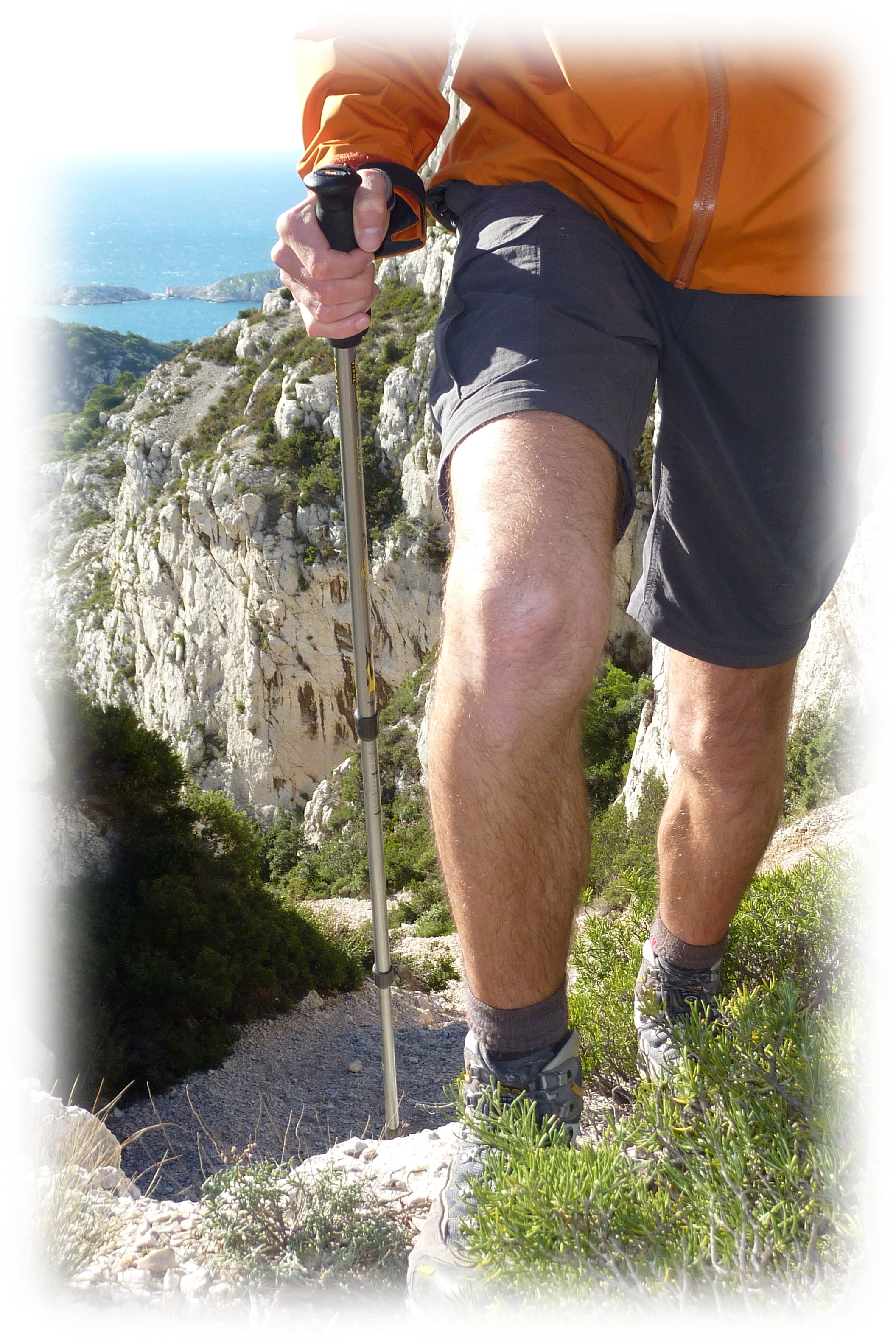 Genou atteint du syndrome rotulien